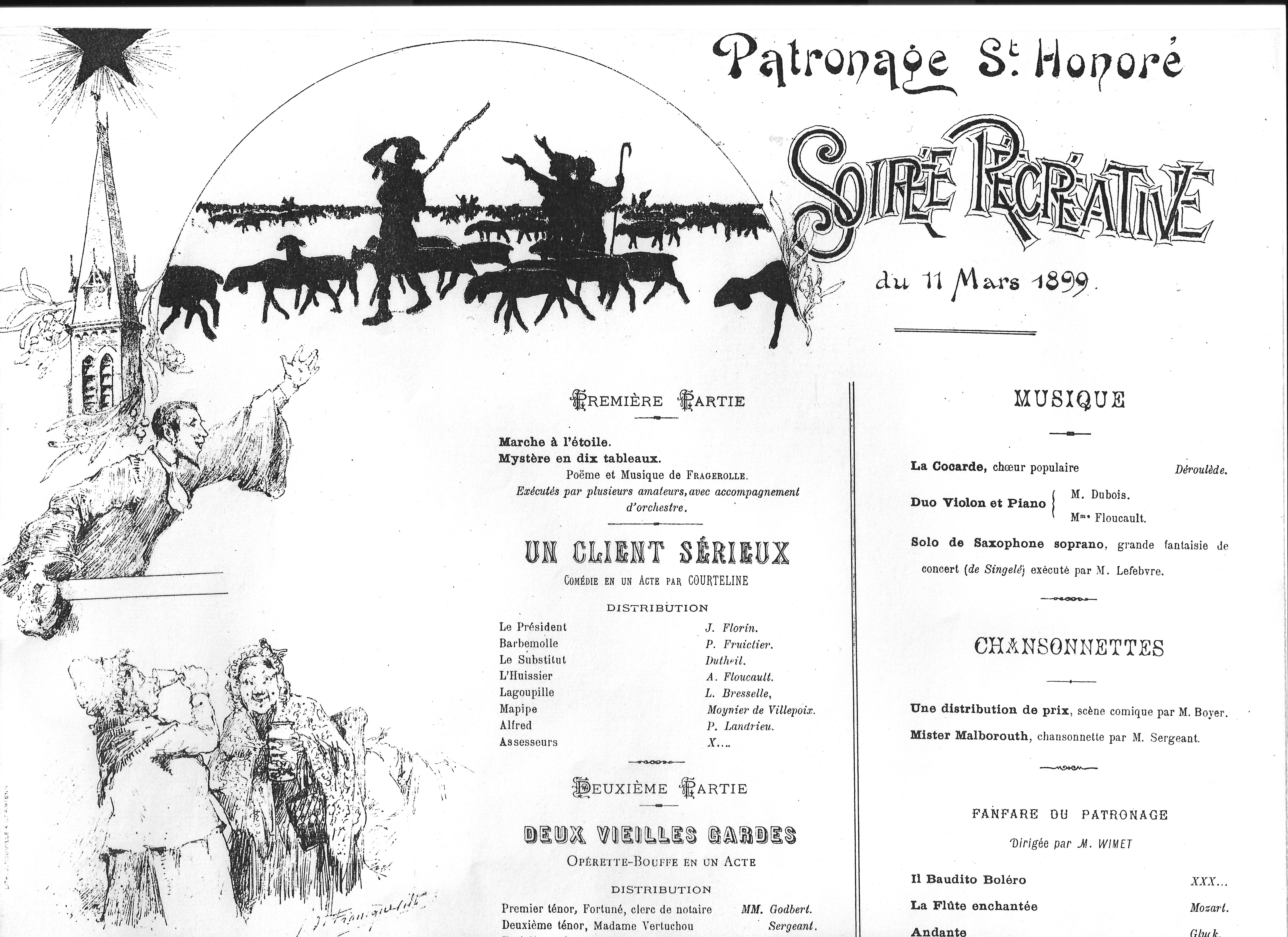 Affiche 1 Jean de francqueville